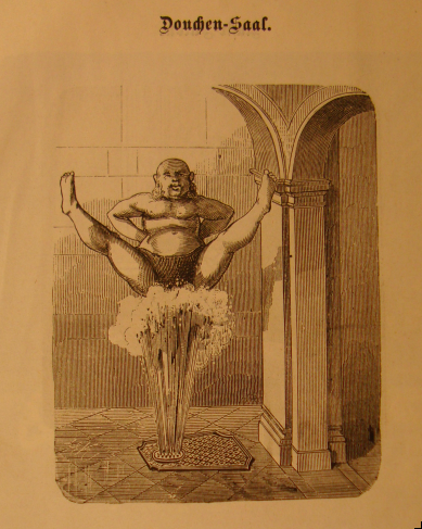 Roemerbad-Wien 1873